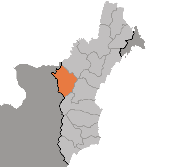 Map of Yonsa, Hamgyong-pukto, DPRK, 2006